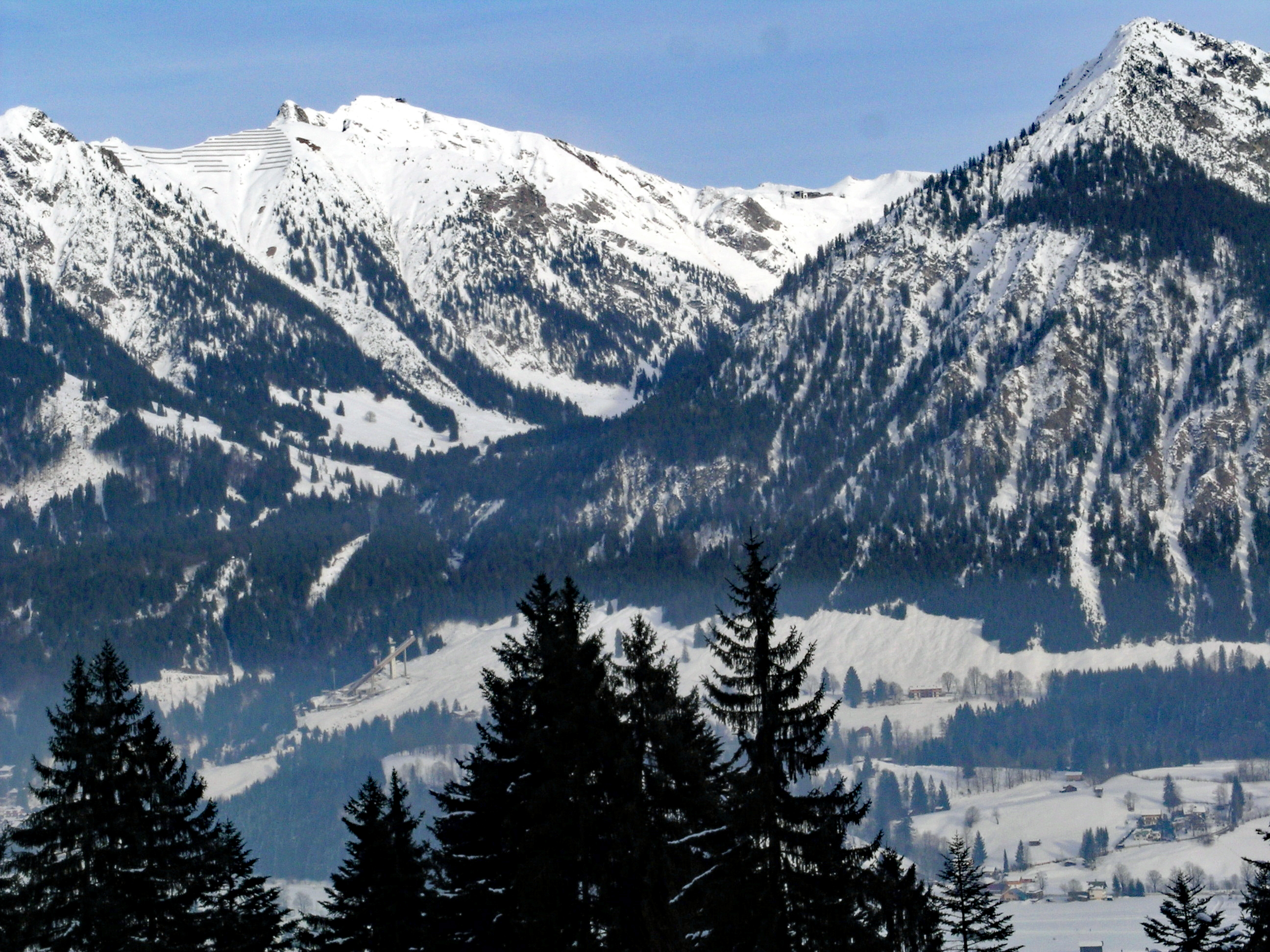 Das 2.224 Meter hohe Nebelhorn, in Oberstdorf. An seinem Fuß die Skisprungschanzen von Oberstdorf